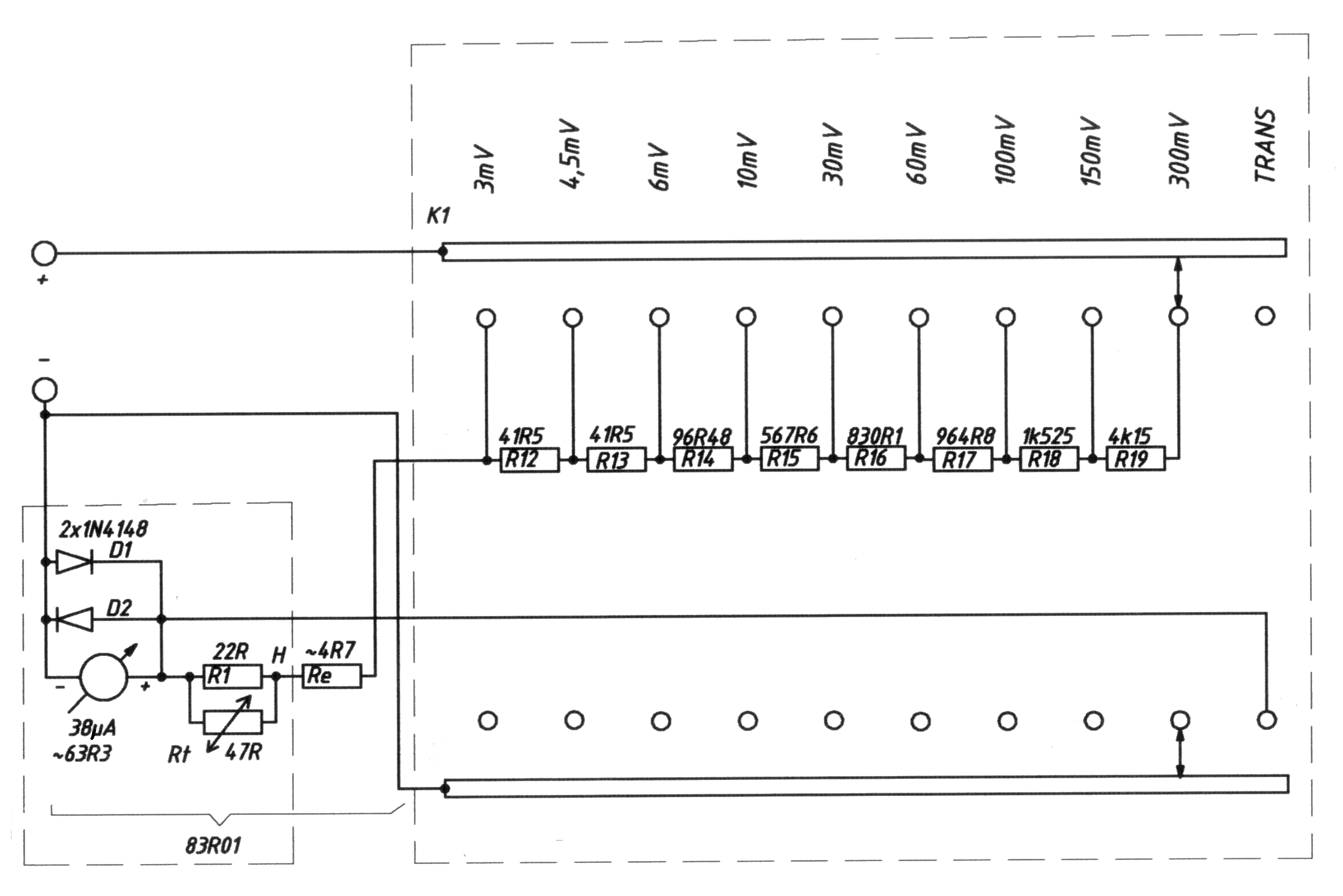 Ellenállásmérés mV mérővel. A műszer kapcsolási rajza.